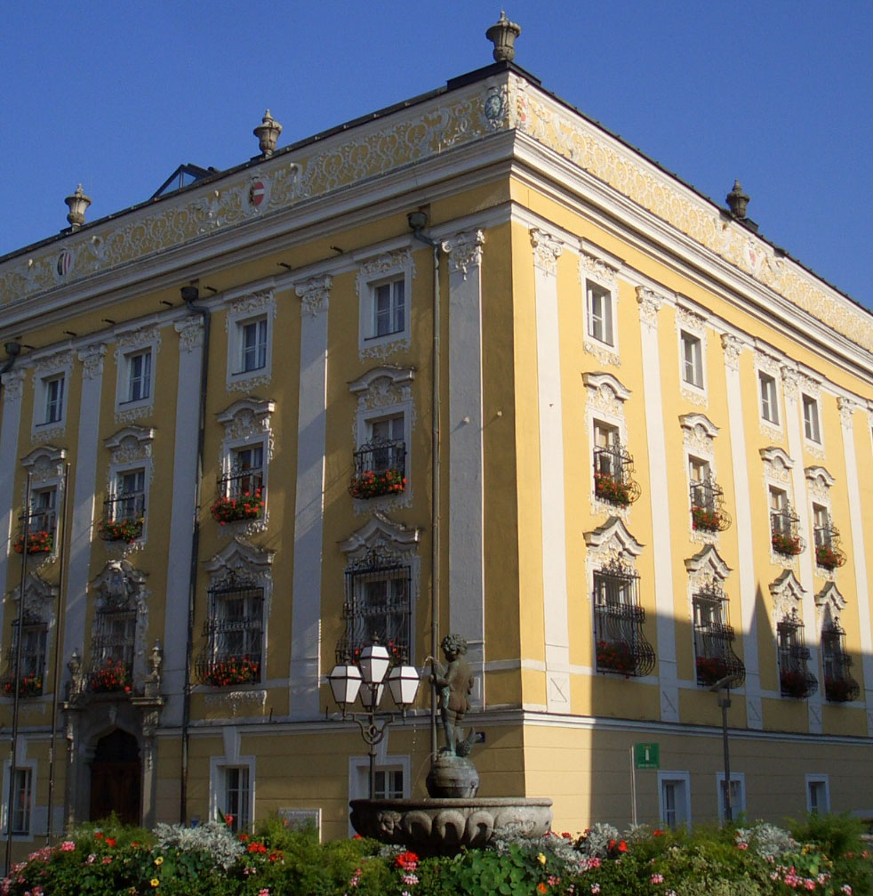 Rathaus der Stadt Wels, im Vordergrund der obere Stadtbrunnen